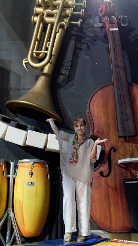 Sabrina Simoni